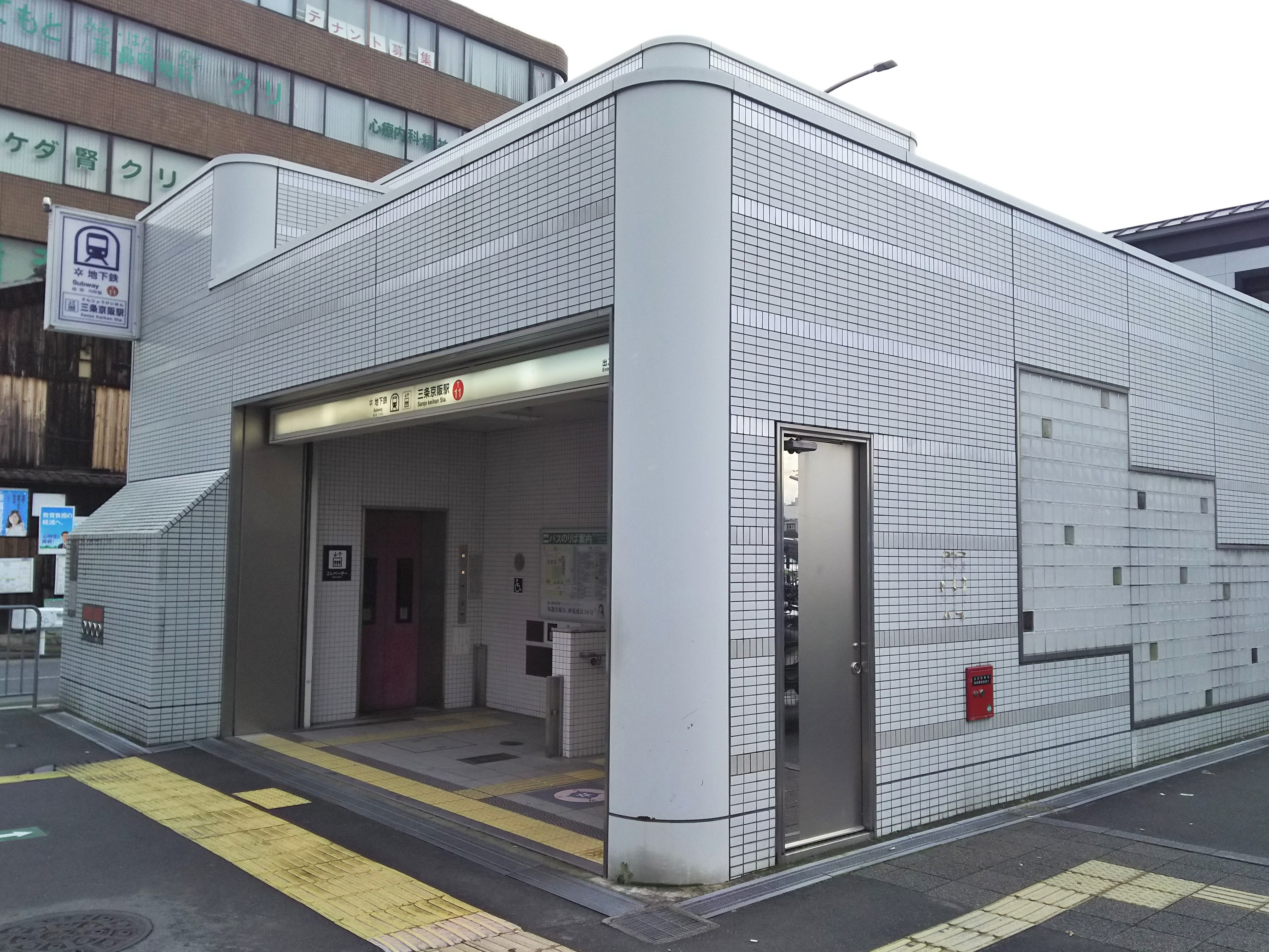 京都市営地下鉄東西線三条京阪駅2番出入り口（京都市東山区）